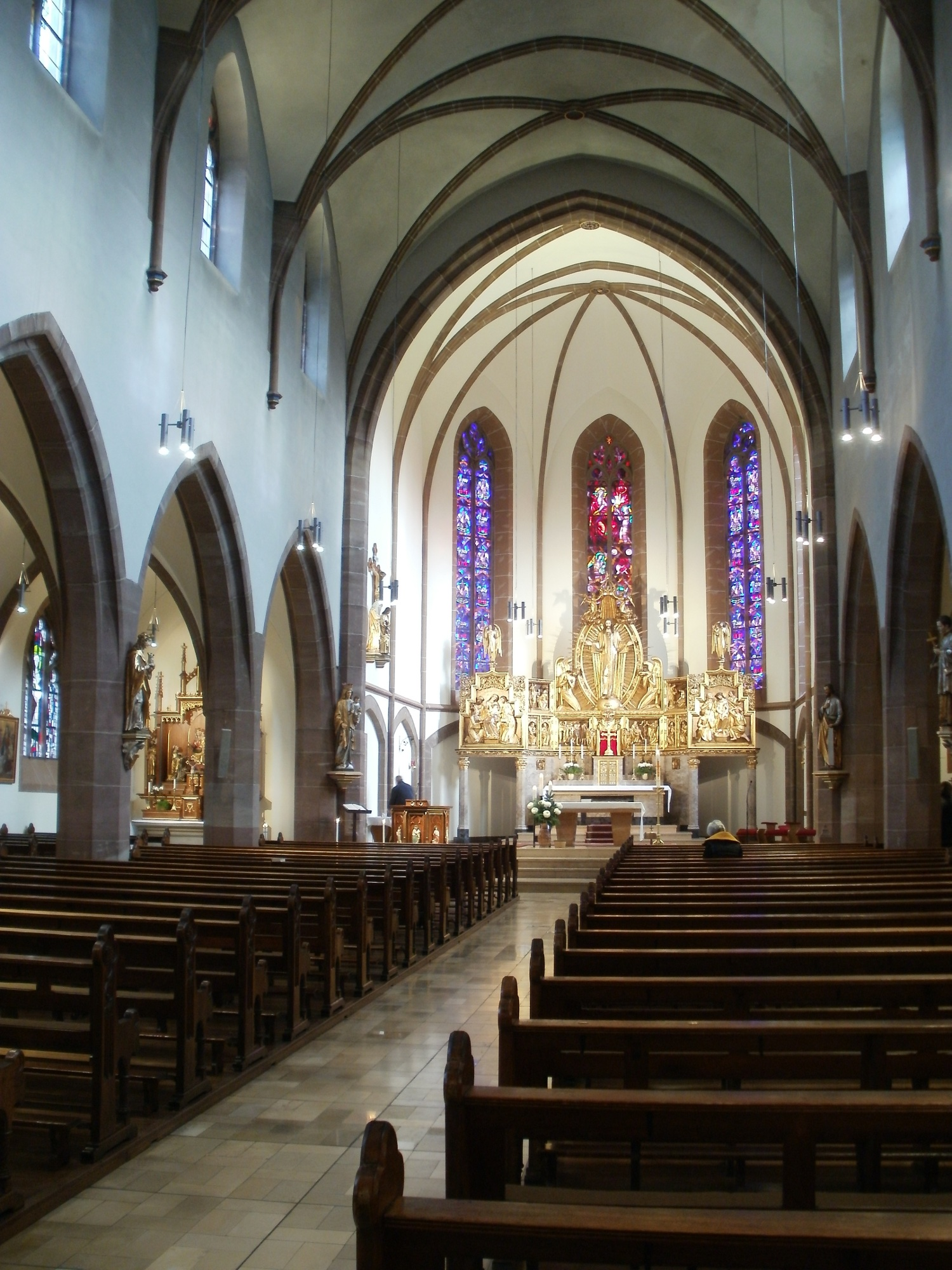 Herz-Jesu (Altenwald)